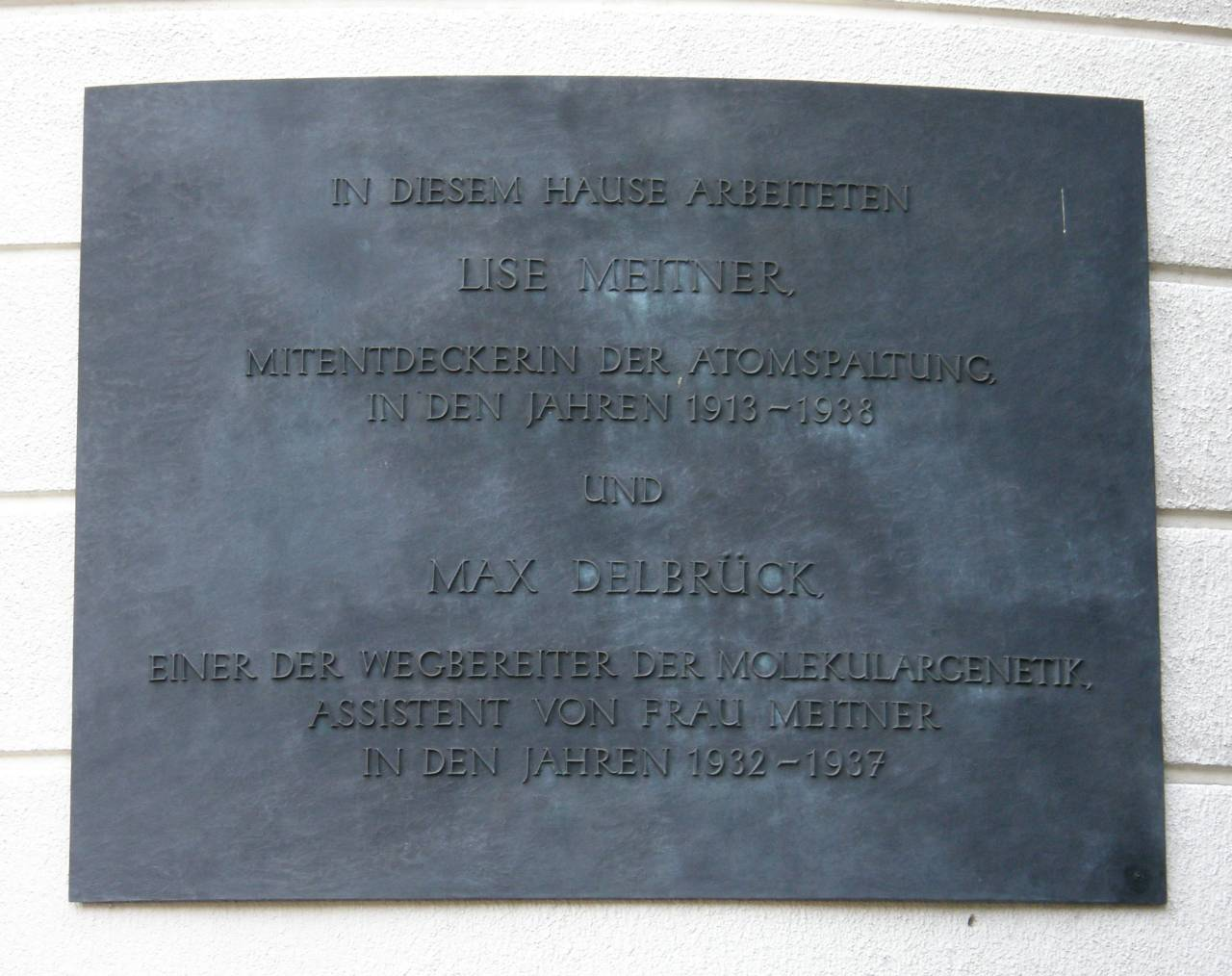 Gedenktafel zur Erinnerung an Lise Meitner (irrtümlich als Mitentdeckerin der Kernspaltung bezeichnet) und Max Delbrück (Pionier der Molekulargenetik), am Otto-Hahn-Bau der Freien Universität Berlin (Thielallee 63 in Berlin-Dahlem).